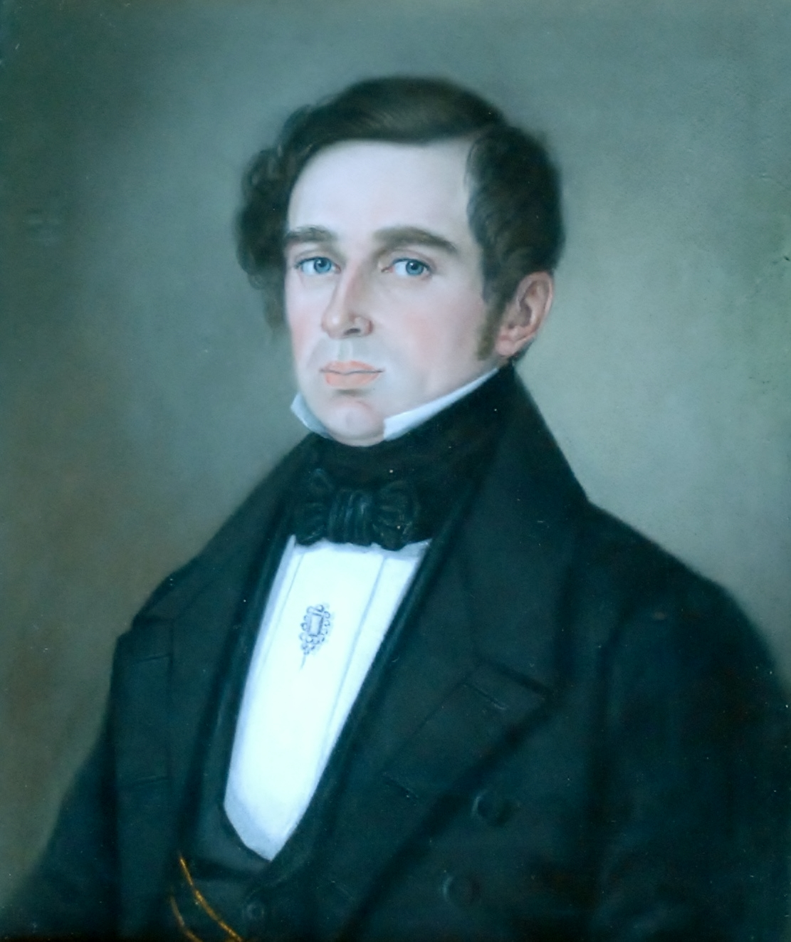 Fotografi av porträtt av lagmannen Fabian Edelstam (1803-1857)